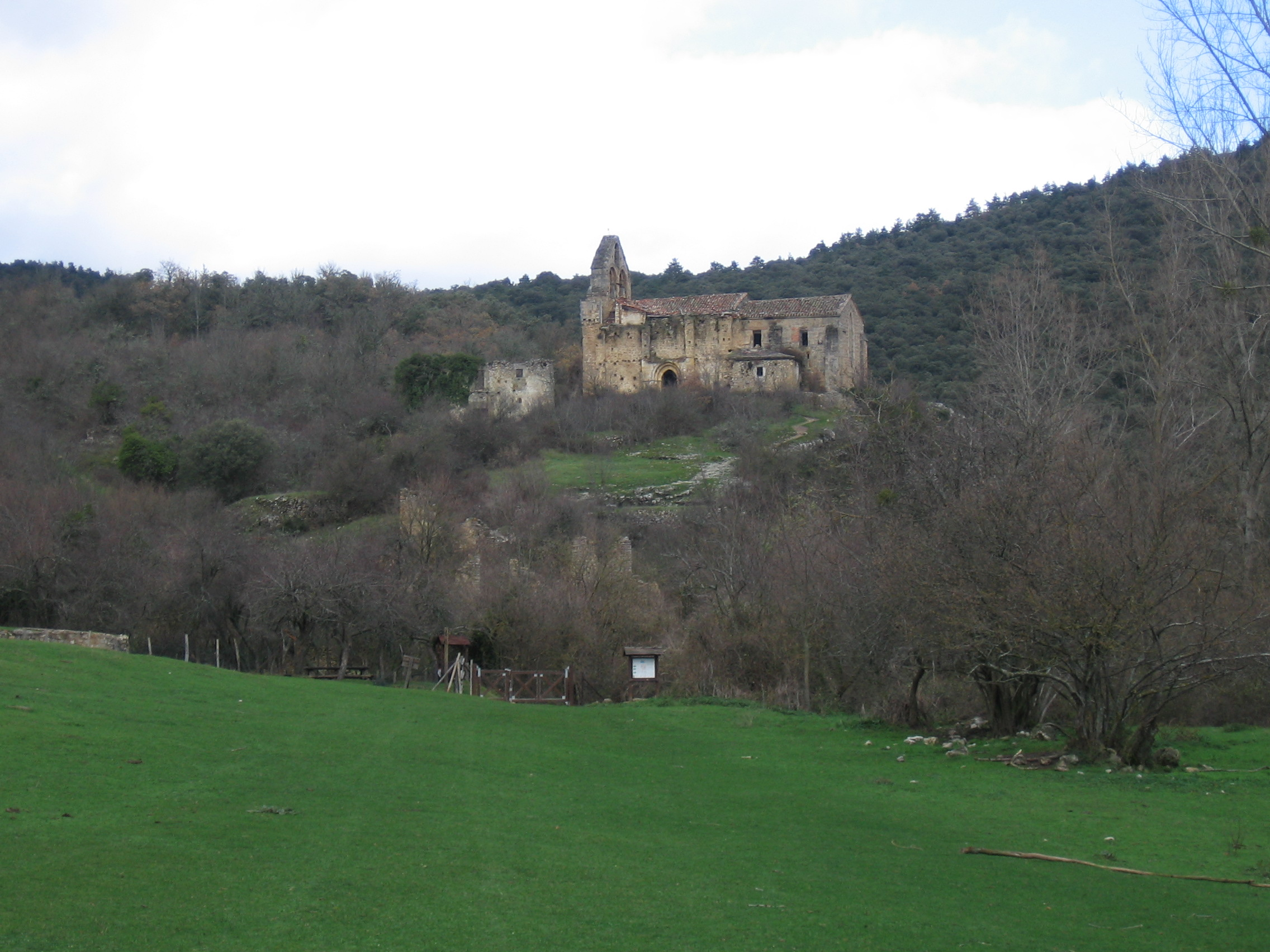 Ribera. Iglesia de San Esteban